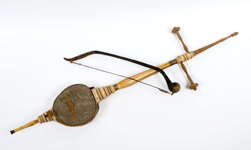 Strijkinstrument (onderdeel). De termen rebab, rabab, en allerlei erop lijkende woorden, worden gebruikt voor een aantal chordofonen, met name luiten en lieren, in Noord-Afrika, het Midden-Oosten, Iran, Centraal-Azië, India en Zuidoost-Azië. Hij komt voor in regio's waar de islam zijn intrede deed. In Indonesië en Maleisië speelt de rebab een prominente rol in de volks- en klassieke tradities. De rebab daar is een spiesluit, met twee tot drie snaren, die bespeeld wordt met een strijkstok. Het onderscheid tussen de verschillende regionale soorten zit hem echter in de constructie, vorm en functie. Zo is de rebab van Midden-Java meestal zo'n 100 cm. lang, terwijl die van West-Java tegen de 115 cm. zijn. Welke herkomst dit instrument heeft is niet bekend. Qua lengte zou West-Java kunnen, maar de Midden-javaanse rebab wordt vaak vergezeld van een rijk versierde standaard, en dat is hier ook het geval. In ieder geval is deze rebab Javaans. De rebab wordt vaak gebruikt in gamelan-ensembles, een of twee per orkest. De rebabspeler begint vaak met een korte introductiesolo. De primaire rol van het instrument is melodisch; hij blijft stil in luide muziekstukken (het is een "soft-ensemble" instrument; in Miller en Williams, 1998:641). . Klankkast van langhalsluit Unknown language: Rebab ; rabab